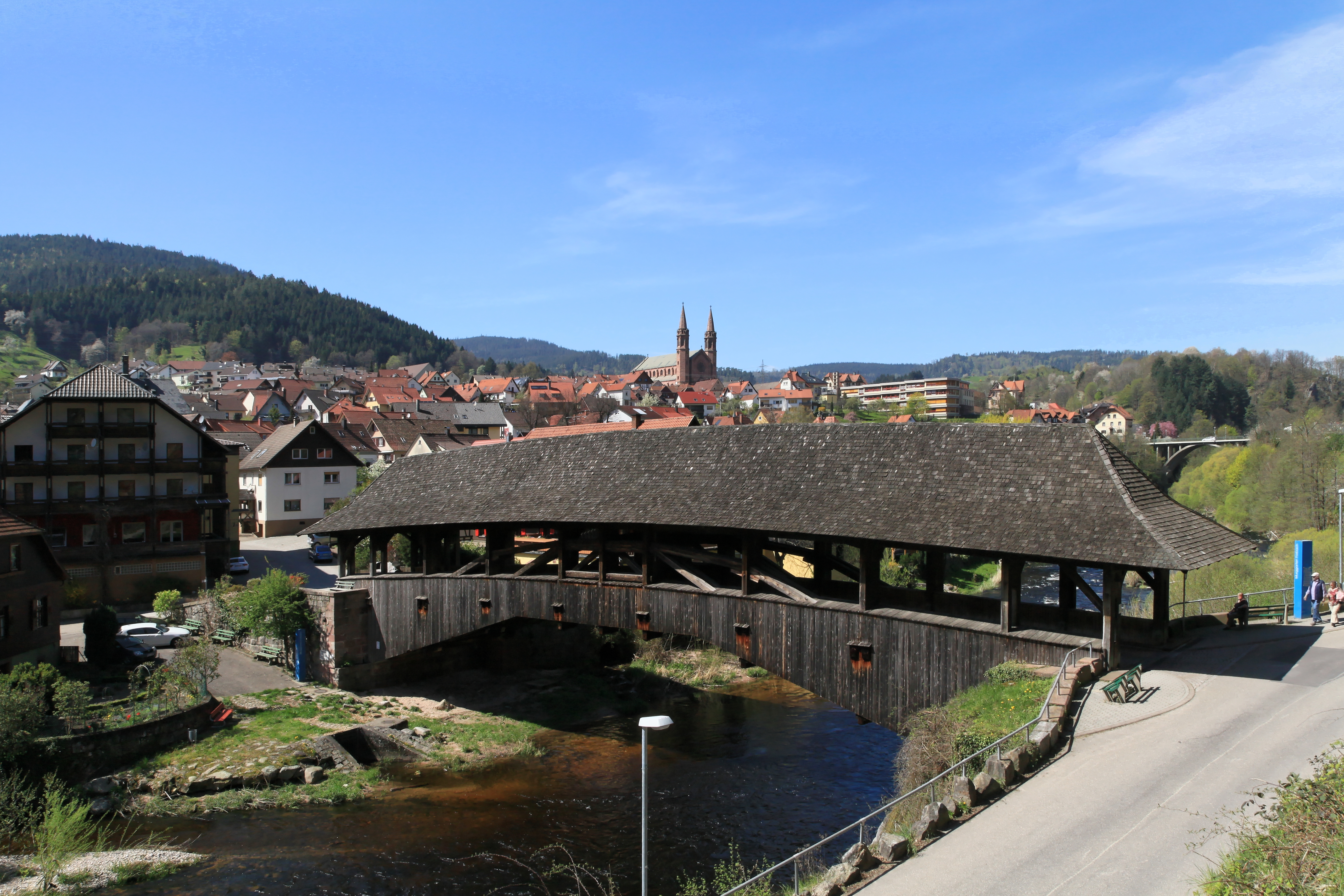 Holzbrücke an der Eckstraße in Forbach (Baden)